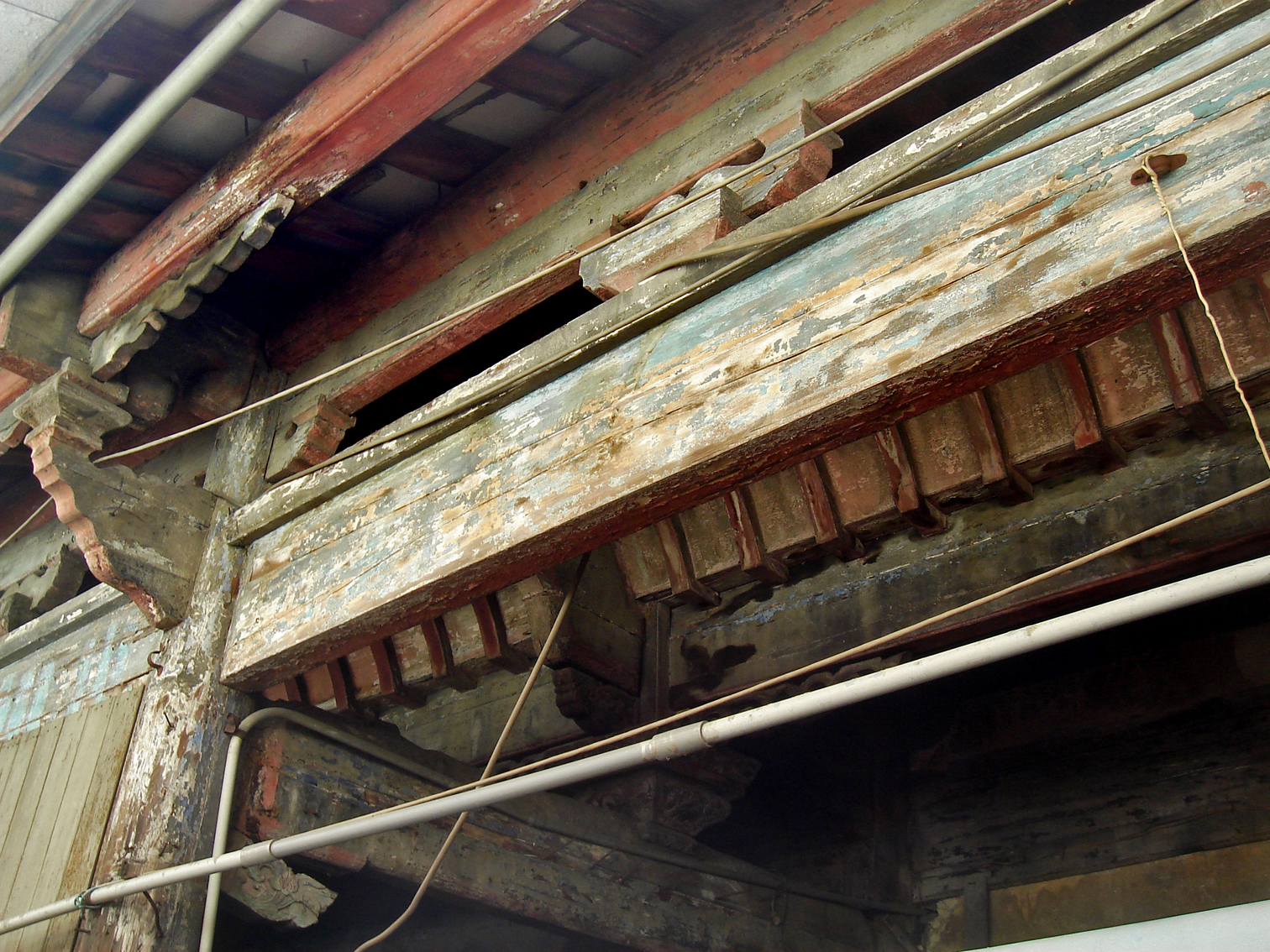 清代儒考棚